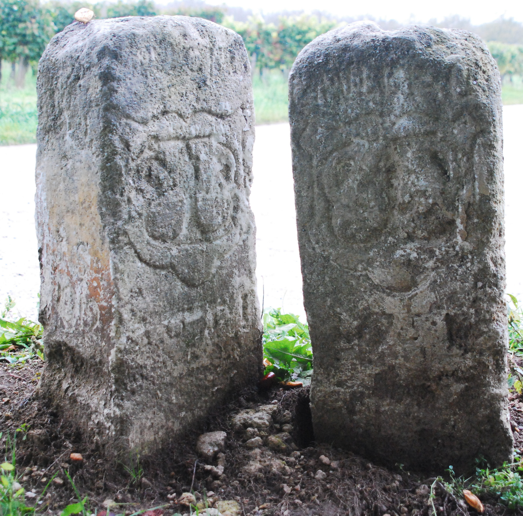 Grenzsteine in der Nähe des Pulkauer Bründls in Pulkau (Niederösterreich)